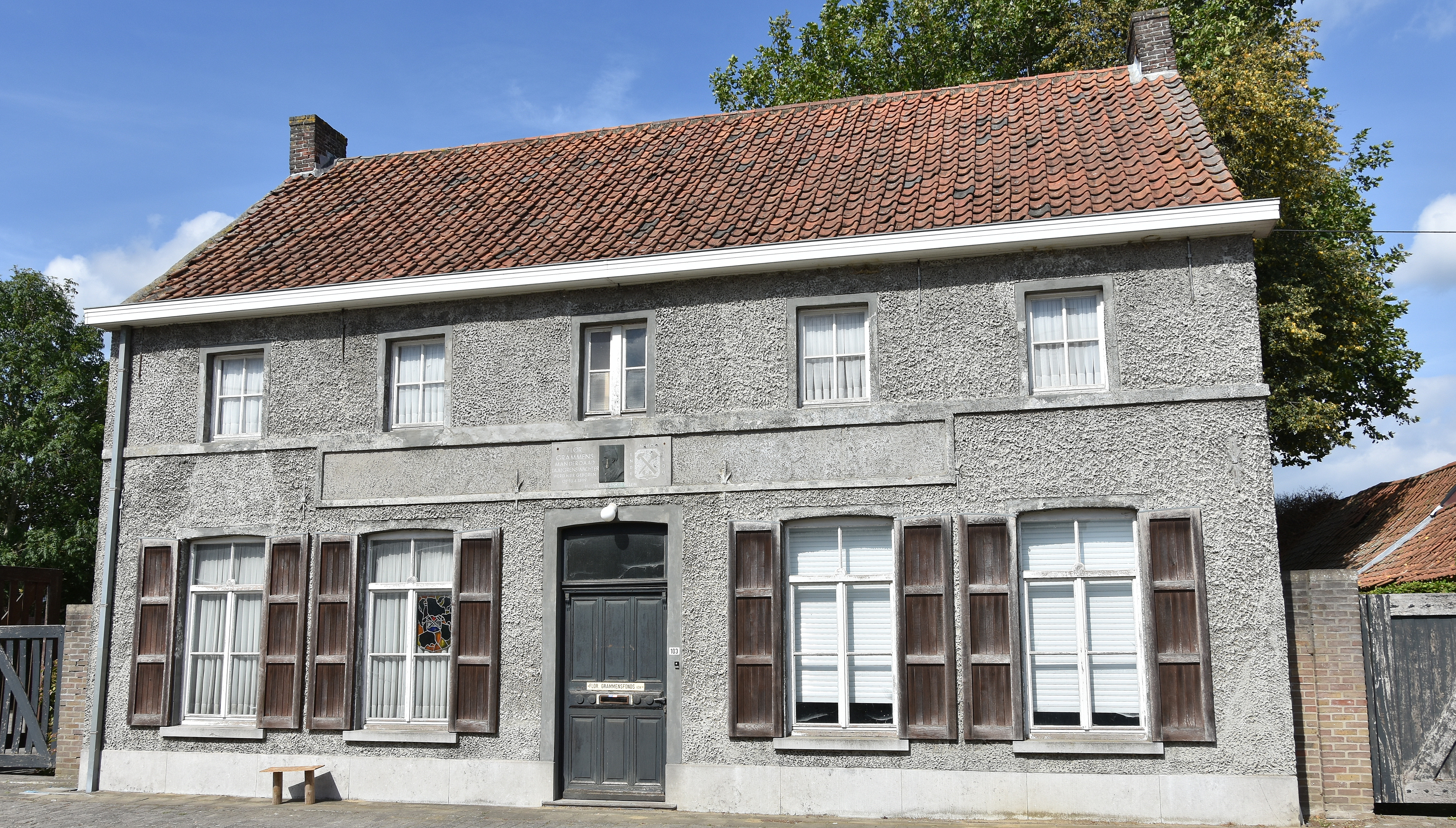 Geboortehuis Flor Grammens (34837) Bellem 30-08-2019 This photo of immovable heritage has been taken in the Flemish Region